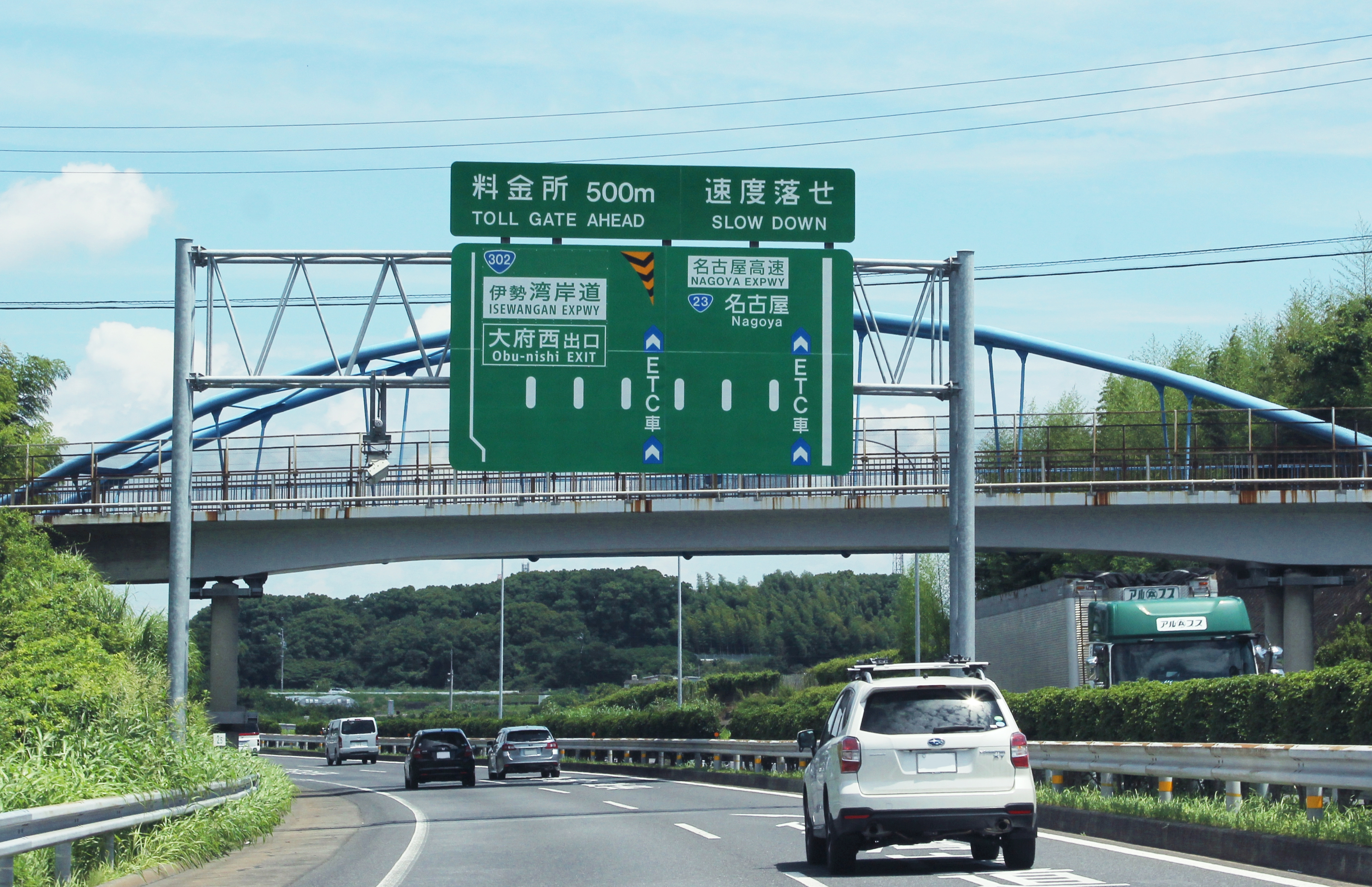 知多半島道路 大高料金所付近の案内標識